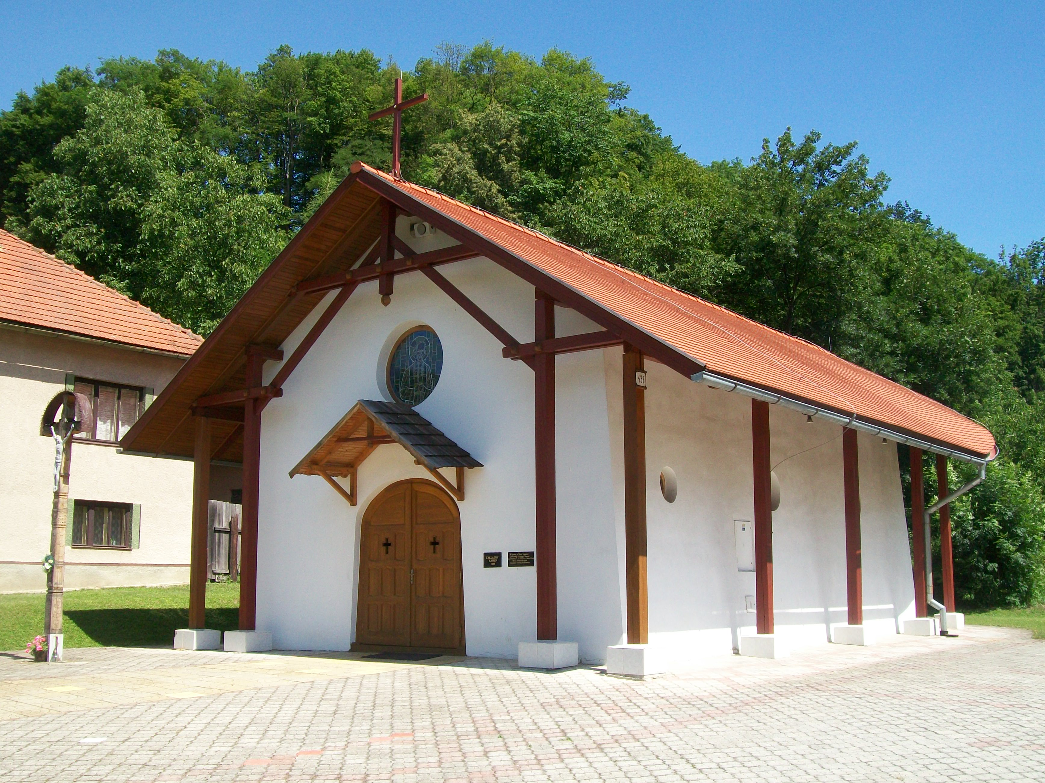 Kaplnka sv. Jána Vianney postavená v Dolnej Bzovej bola posvätená 7. 11. 1999 diecéznym biskupom rožňavským Mons. Edvardom Kojnokom